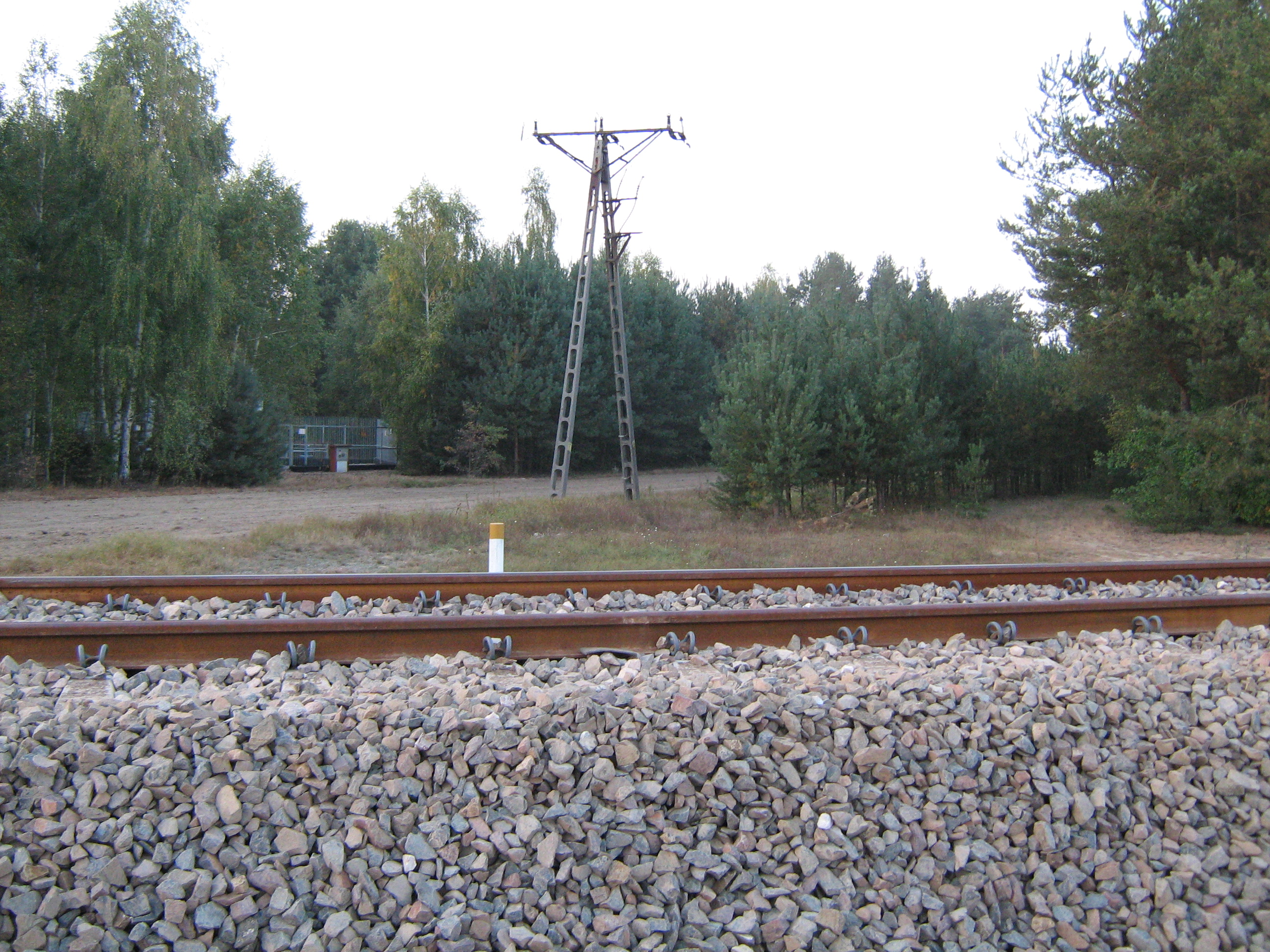 Zmodernizowana linia kolejowa nr 15 Bednary - Łódź Kaliska, w oddali stacja pomiarowa rurociągu naftowego łączącego Koluszki z Płockiem. Zdjęcie wykonane w pobliżu wsi Nowe Grudze.